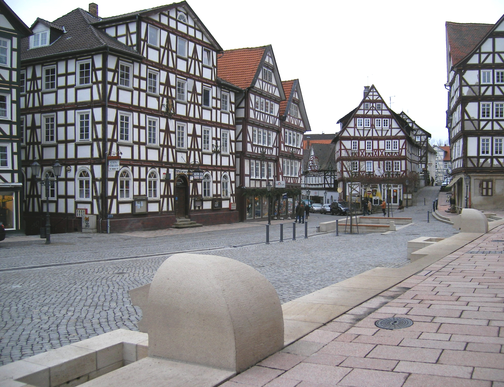 Blick auf den Weißen Hof